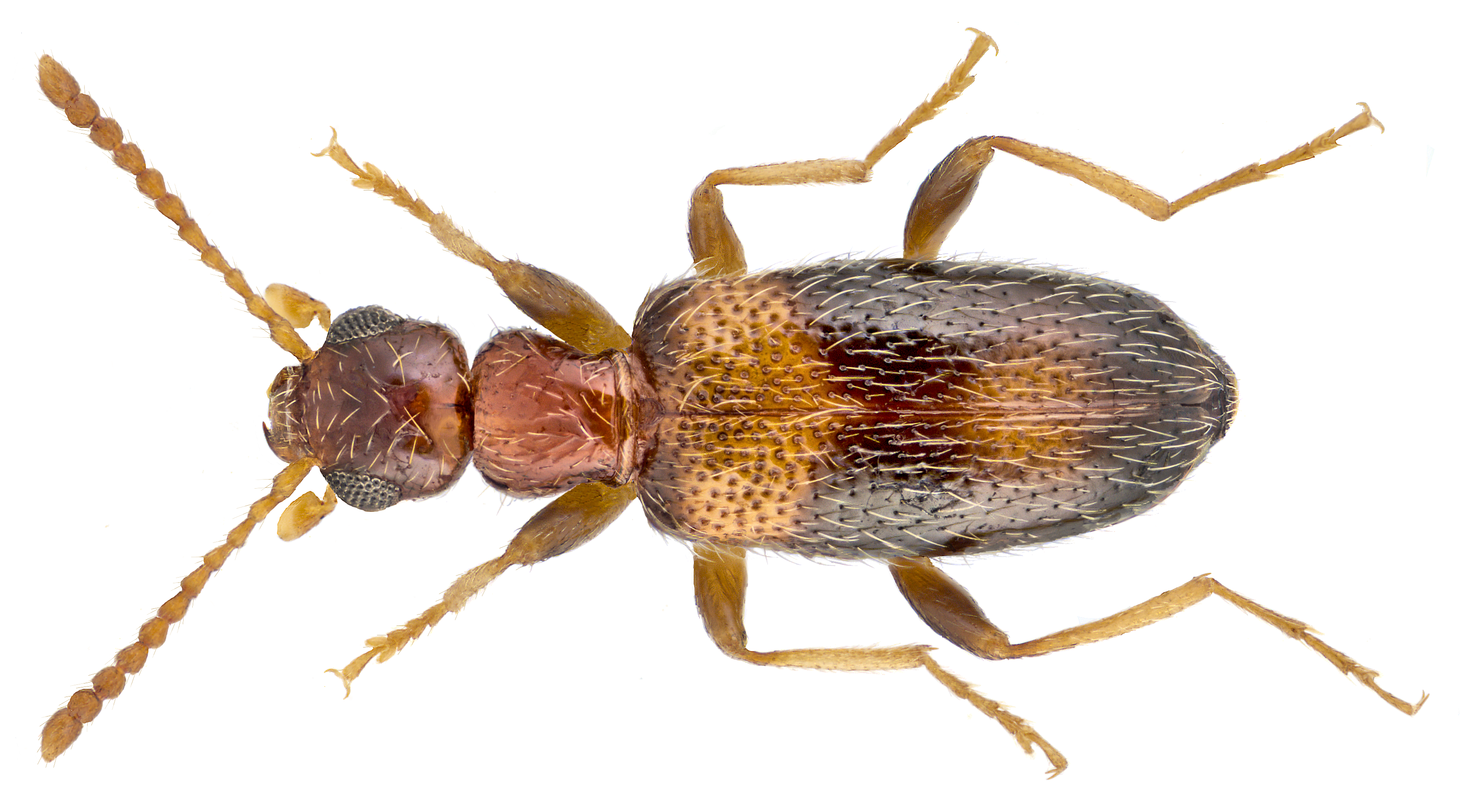 Family: Anthicidae Size: 3 mm Location: Gambia, Serekunda leg. U.Schmidt, 1990; det. D.Telnov, 2008 Photo: U.Schmidt, 2015